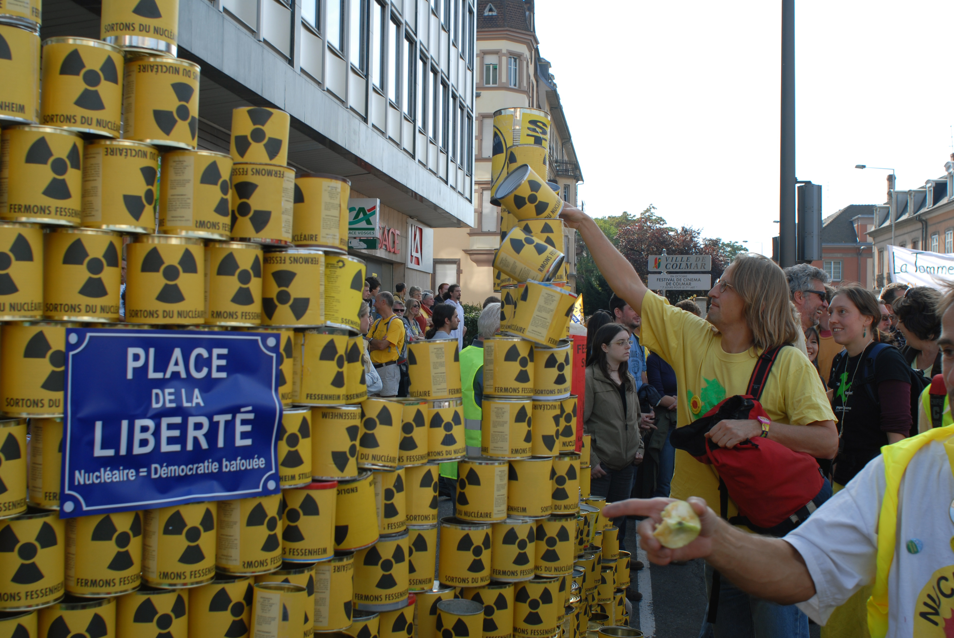 Pyramide de déchets en conserve, Colmar 2009